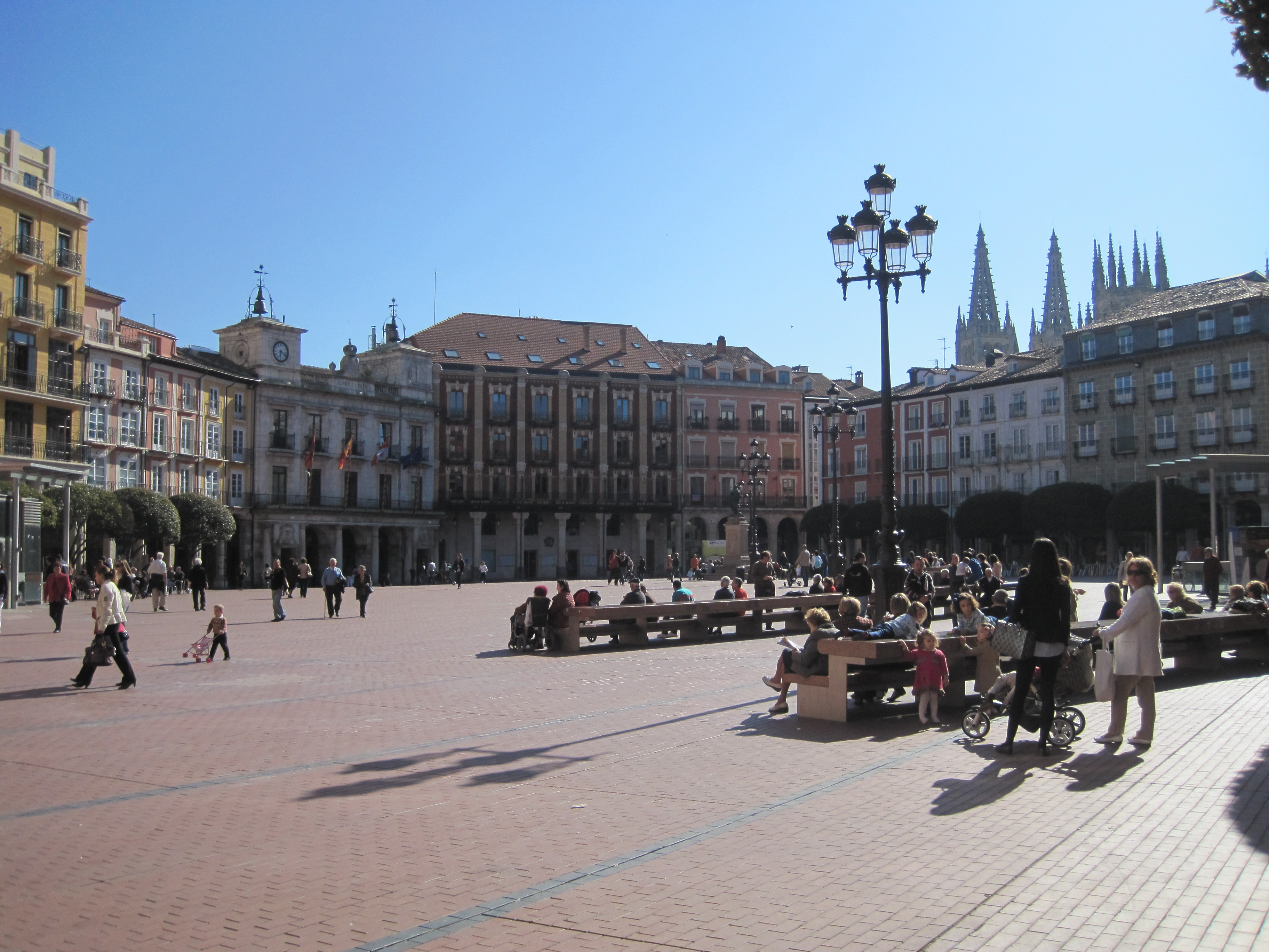 Plaza Mayor de Burgos desde la parte norte.